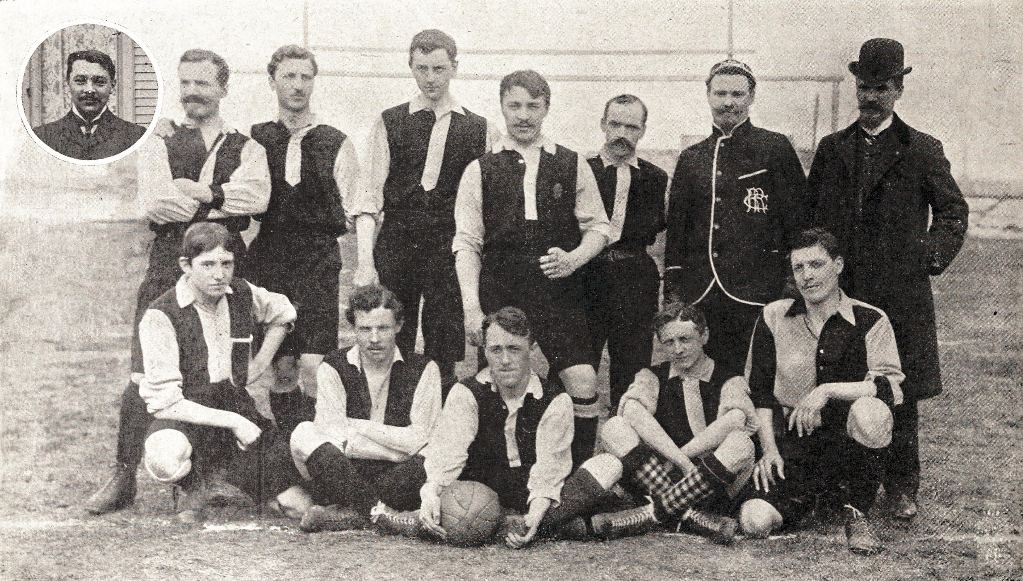 Equipe du Racing Club roubaisien championne de France en 1902. Debout : Ernest Lesur, Mongay, Peacock, Léon Dubly, Scott, Emile Lesur, Henri Lesur. Assis : Sartorius, Lefebvre, A. Dubly, Gadenne, Hargrave. Médaillon : non précisé